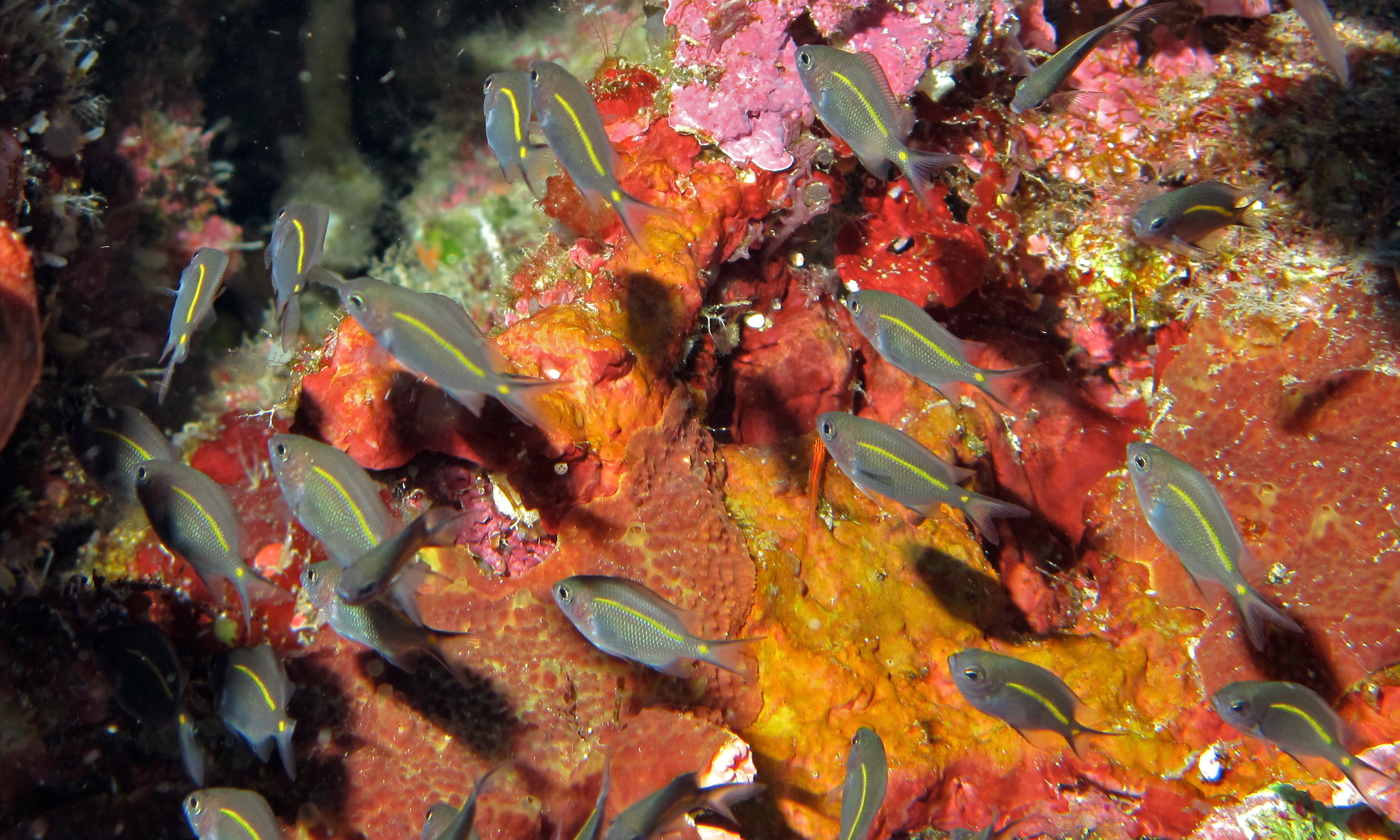 Likuan II, Bunaken Island, Sulawesi, INDONESIA